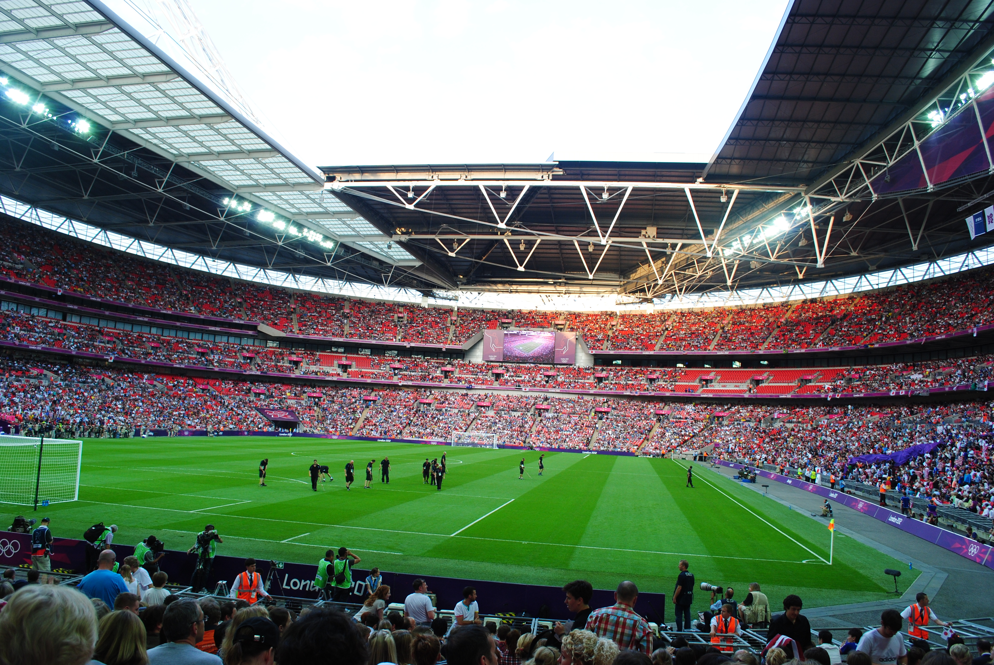 USA vs Japan